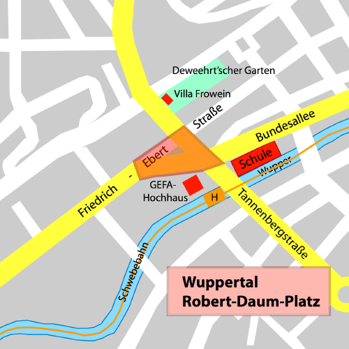 Skizze des Robert-Daum-Platz, Wuppertal, Germany